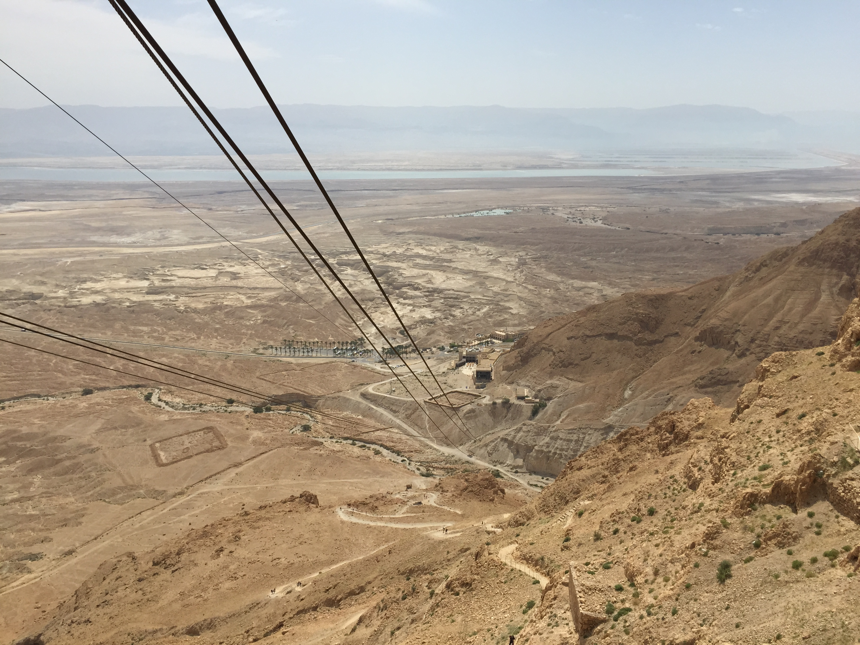 צילום הרכבל היורד ממצדה, 2015